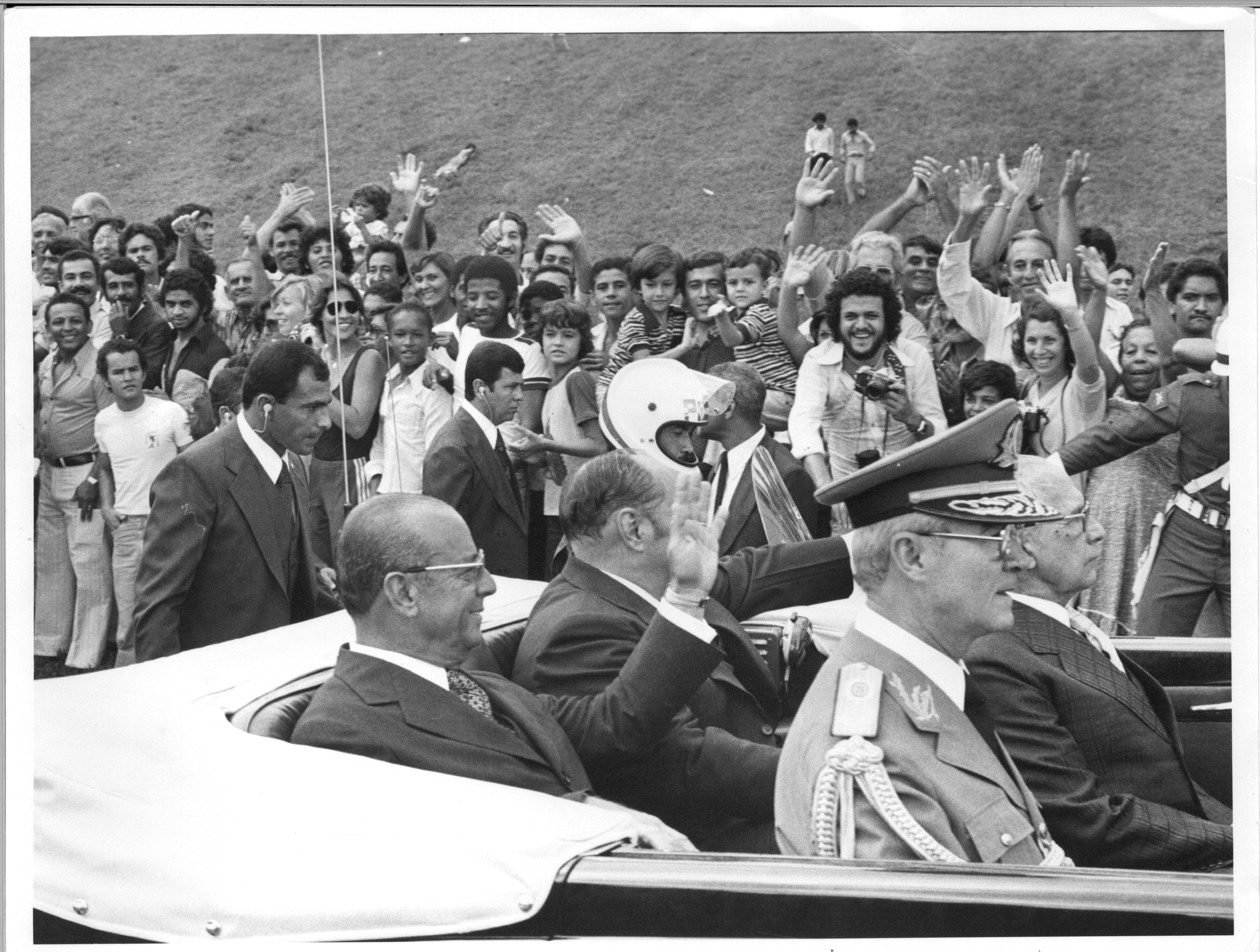 Presidente da República João Figueiredo no clássico desfile no Rolls-Royce ao lado de Aureliano Chaves seu vice. Posse do presidente João Figueiredo em 15 de março de 1979, em sessão conjunta do Congresso Nacional, presidida pelo Senador Luís Viana. O mandato presidencial, de acordo com a Emenda Constitucional nº 08/77, passou a ser de 6 anos. João Figueiredo foi o último dos Presidentes Militares. Foi eleito por eleição indireta. Foto: Senado Federal